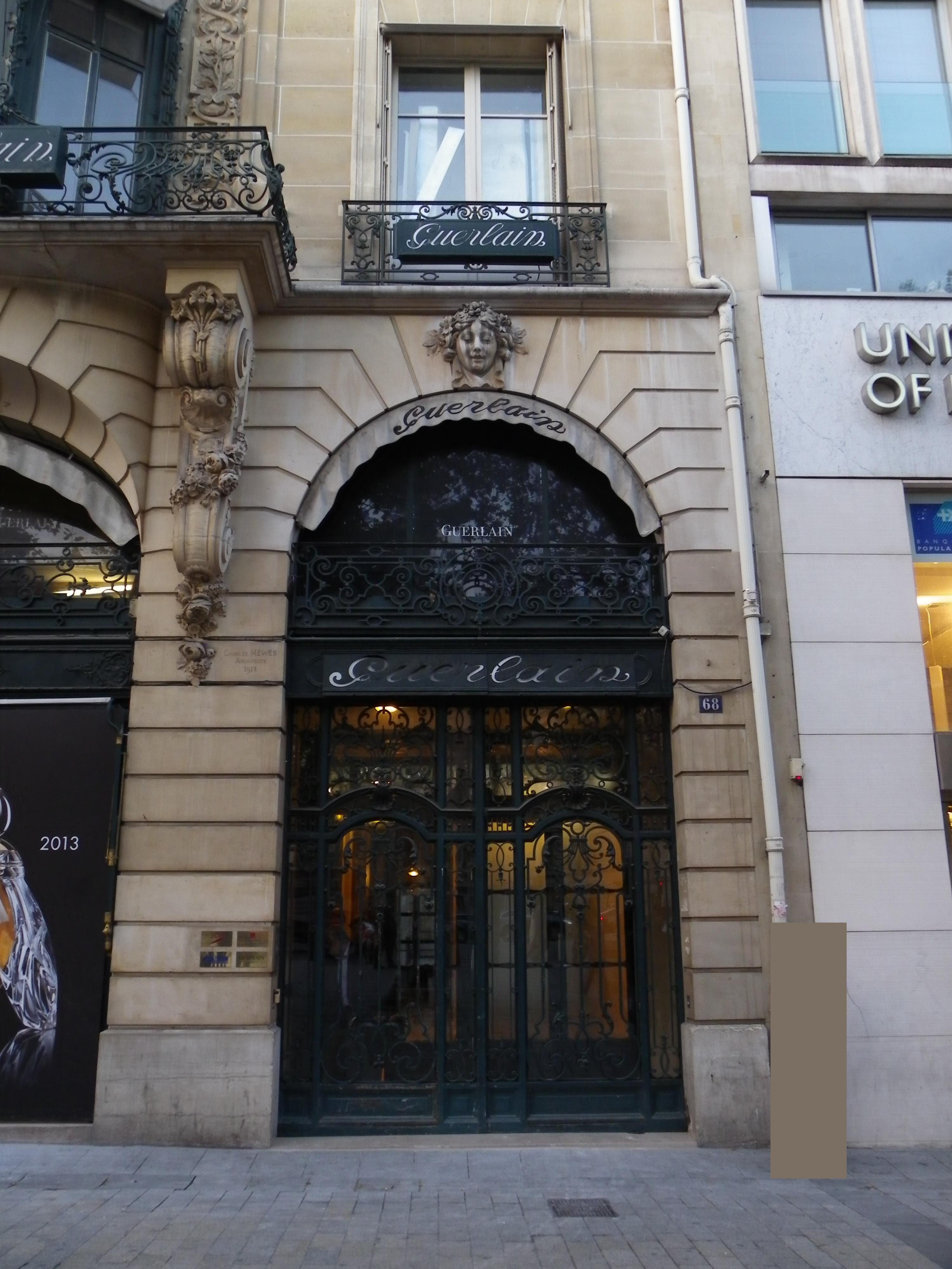 Boutique Guerlain au 68 avenue des Champs-Elysées à Paris (Inscrit) .